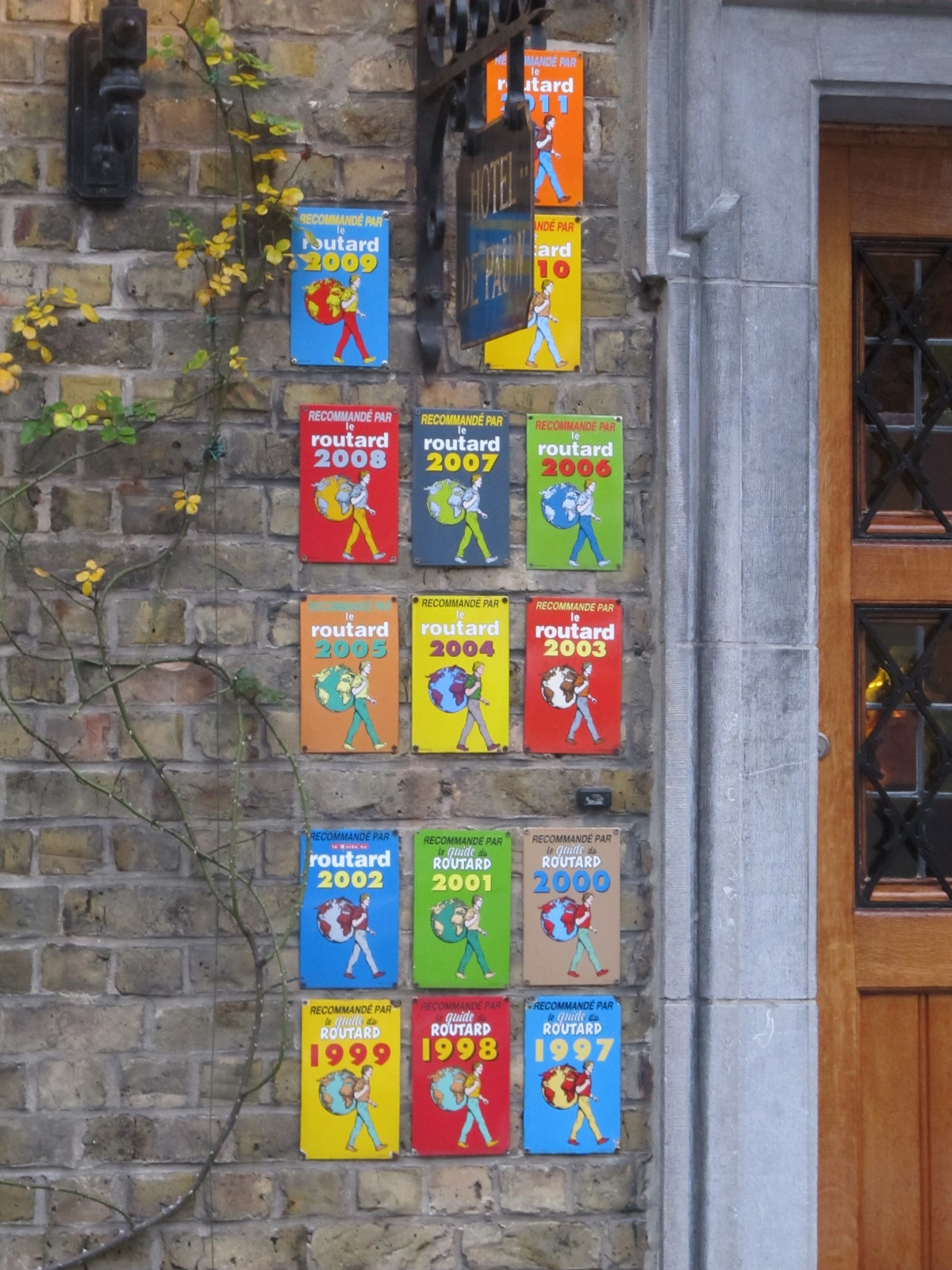 20111226 Brugge